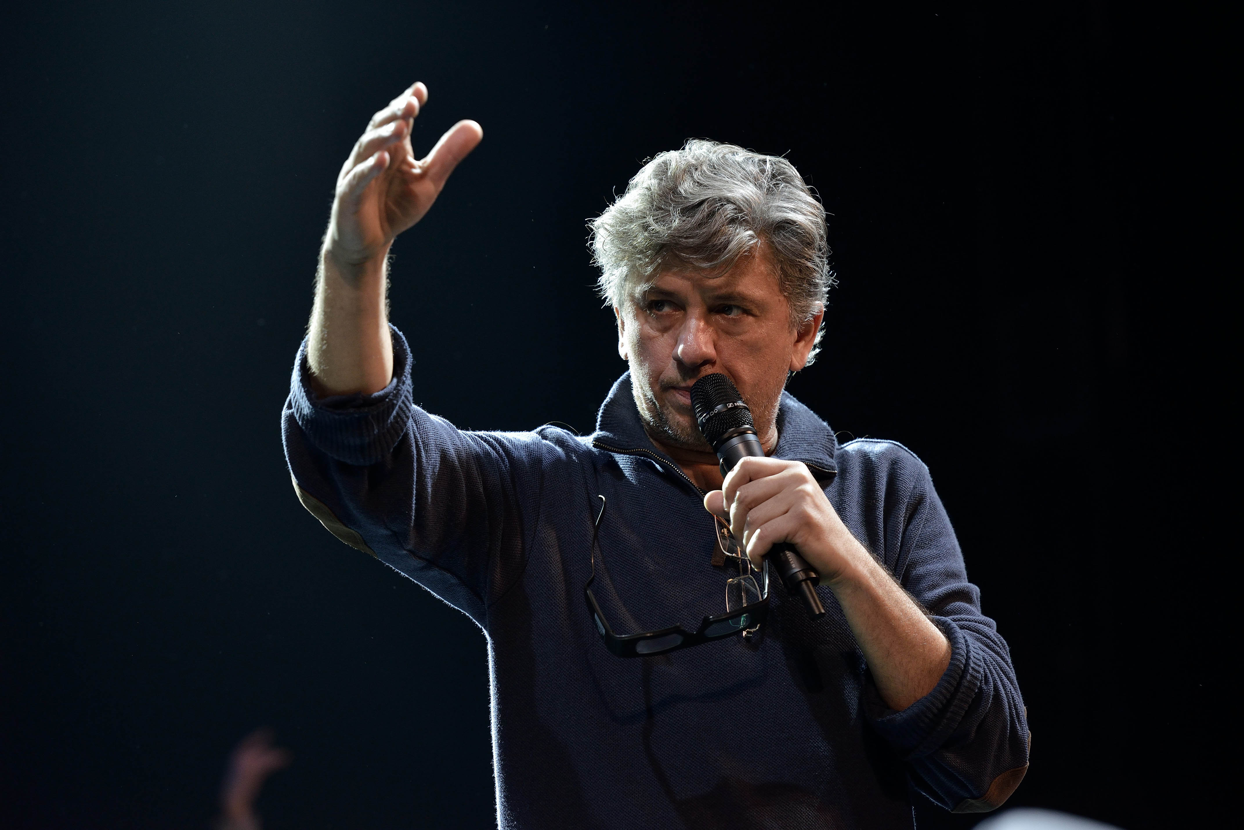 На пресс-показе "Пола Негри"